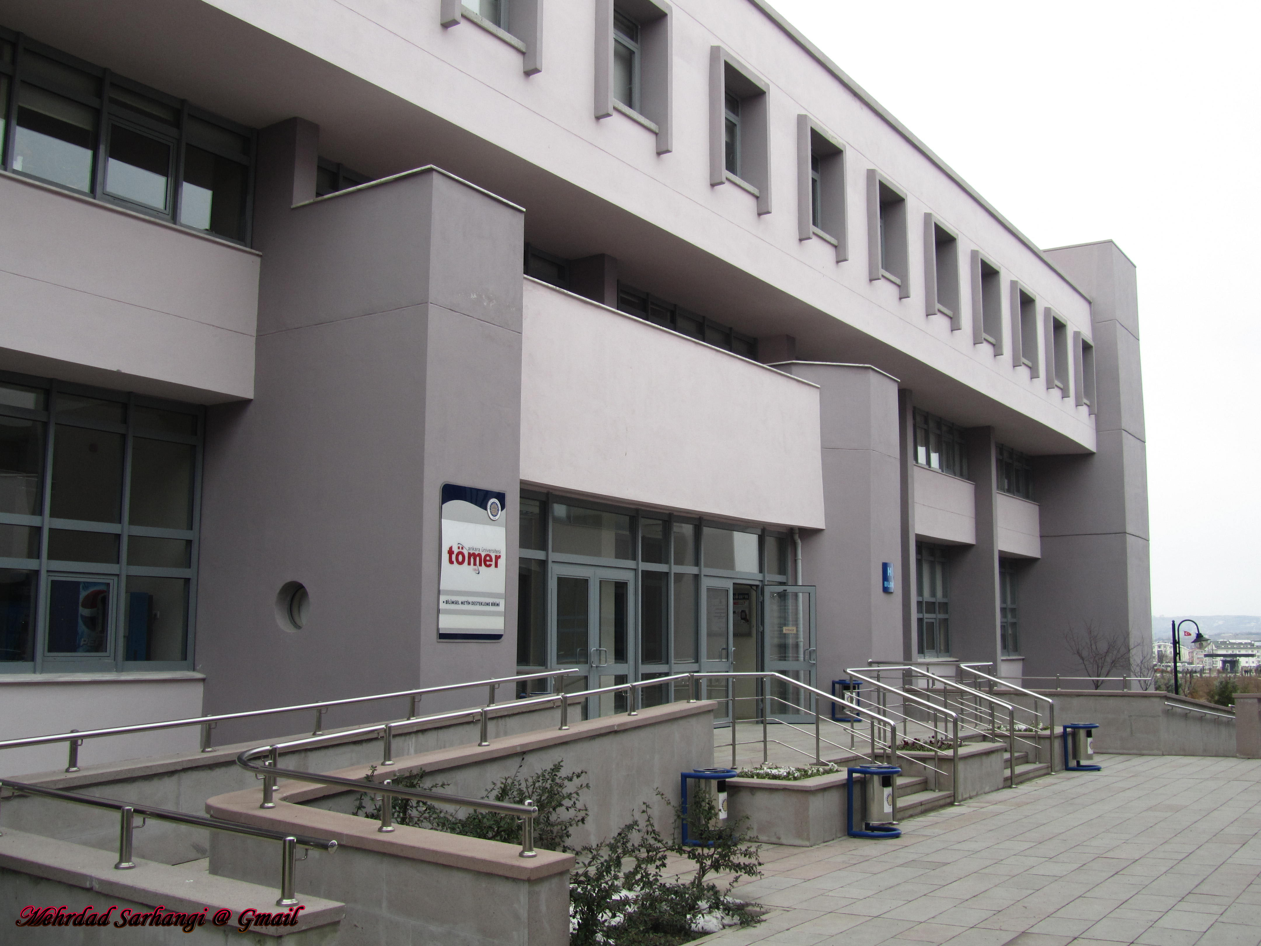 Ankara ünivesitesi TÖMER merkezi